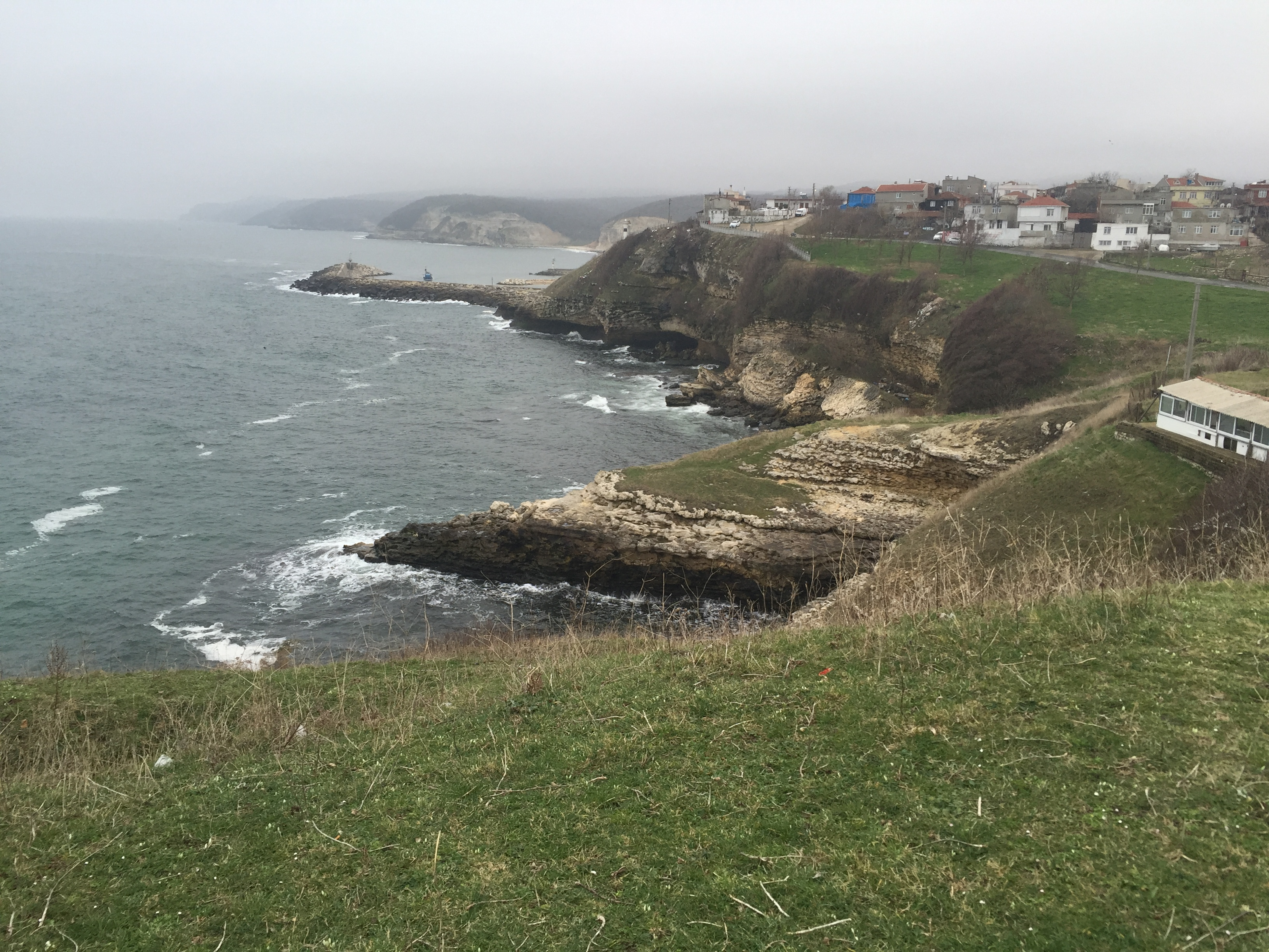 39400 Kıyıköy/Vize/Kırklareli, Turkey